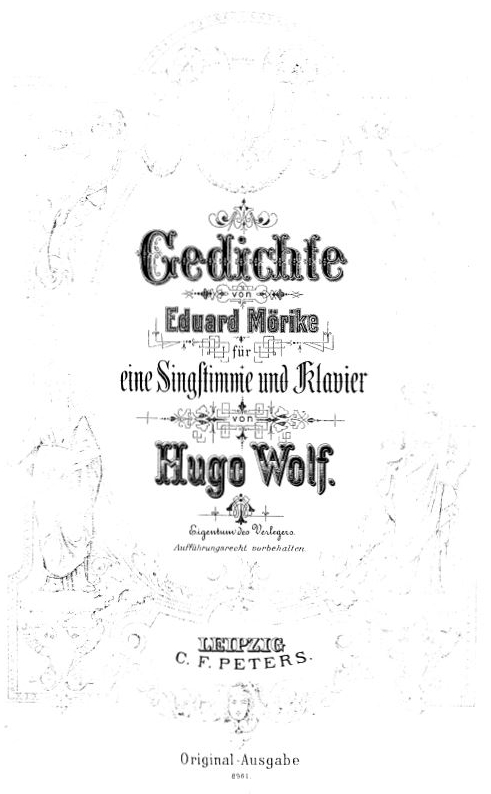 53 Lieder für eine Singstimme und Klavier als vertonte Gedichte von Eduard Mörike, Originalausgabe aus der Sammlung Fritz Kauffmann